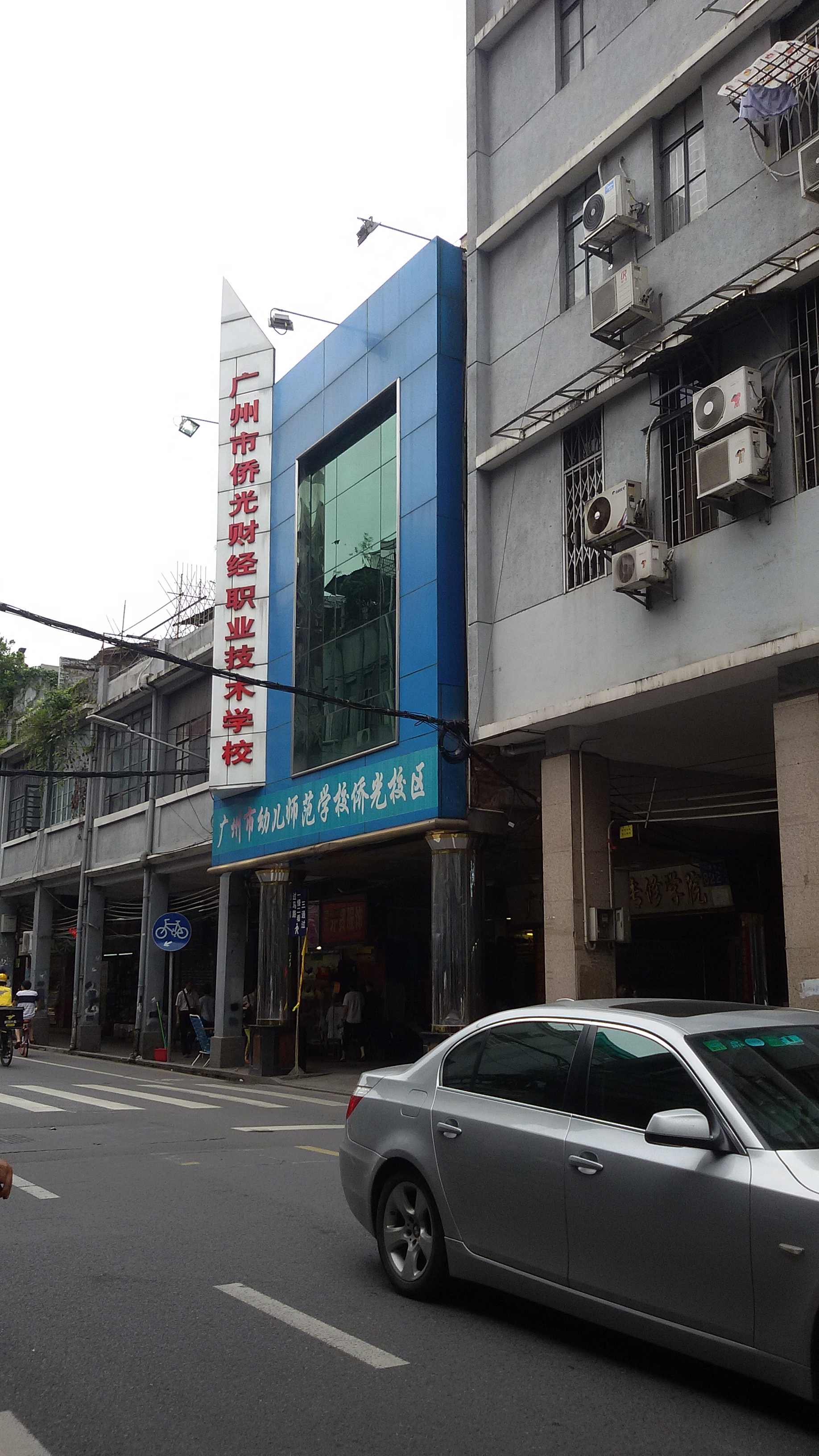 粵語: 廣州市僑光財經職業技術學校